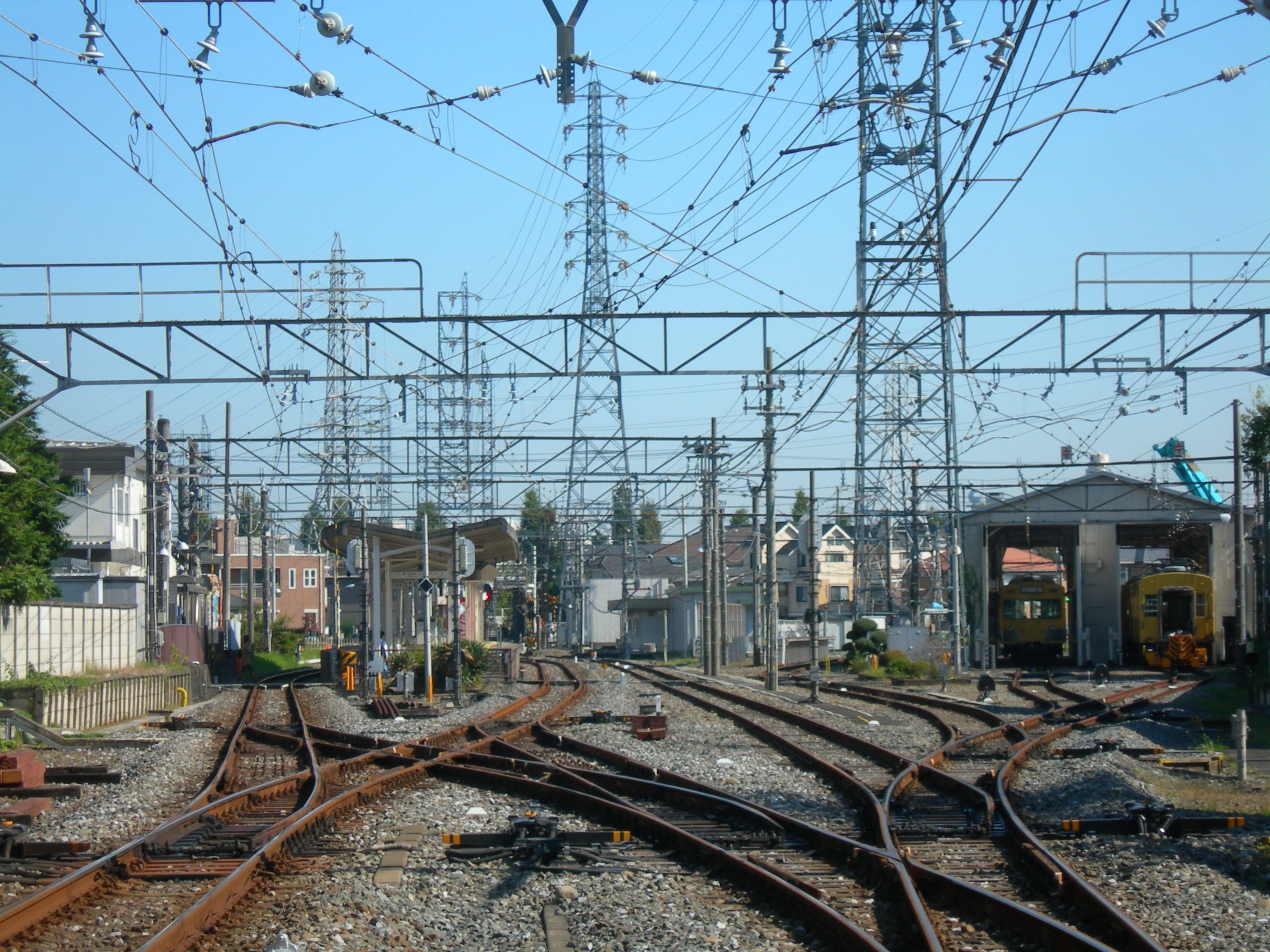 西武多摩川線白糸台駅駅構内